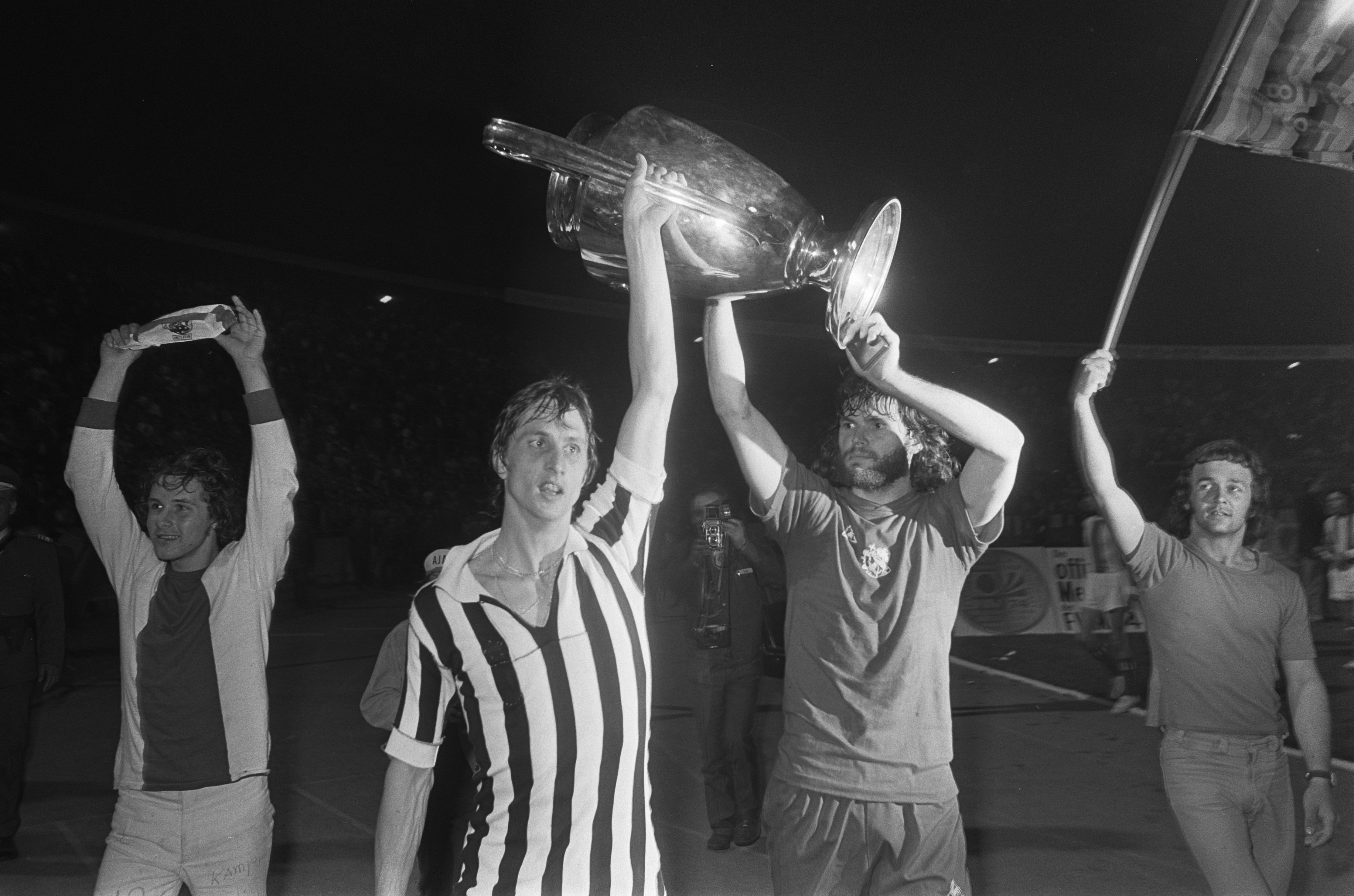 Collectie / Archief : Fotocollectie Anefo Reportage / Serie : [ onbekend ] Beschrijving : Finale Europacup I in Belgrado, Ajax tegen Juventus 1-0 Cruijff en Hulshoff (rechts) met de beker Datum : 30 mei 1973 Locatie : Belgrado Trefwoorden : sport, voetbal Persoonsnaam : Cruijff, Johan, Hulshoff, Juventus Fotograaf : Mieremet, Rob / Anefo Auteursrechthebbende : Nationaal Archief Materiaalsoort : Negatief (zwart/wit) Nummer archiefinventaris : bekijk toegang 2.24.01.05 Bestanddeelnummer : 926-4453